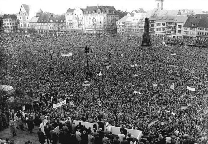 ADN-ZB Hirndorf 20.3.90 fd Erfurt: Wahlkampf. Mit Hochrufen und Beifall, aber auch Pfiffen wurde BRD-Bundeskanzler Helmut Kohl bei seinem ersten Wahlkampfauftritt in der DDR empfangen. Auf dem Domplatz begrüßen den CDU-Vorsitzenden etwa 100.000 Einwohner und Gäste der Thüringer Bezirksstadt.